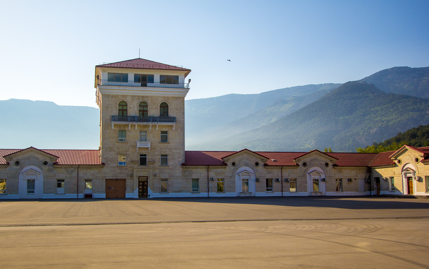 Будівля головного корпусу комплексу винних підвалів «Масандра», Масандра, смт Массандра, вул. Винороба Єгорова, 9, літер «Б»